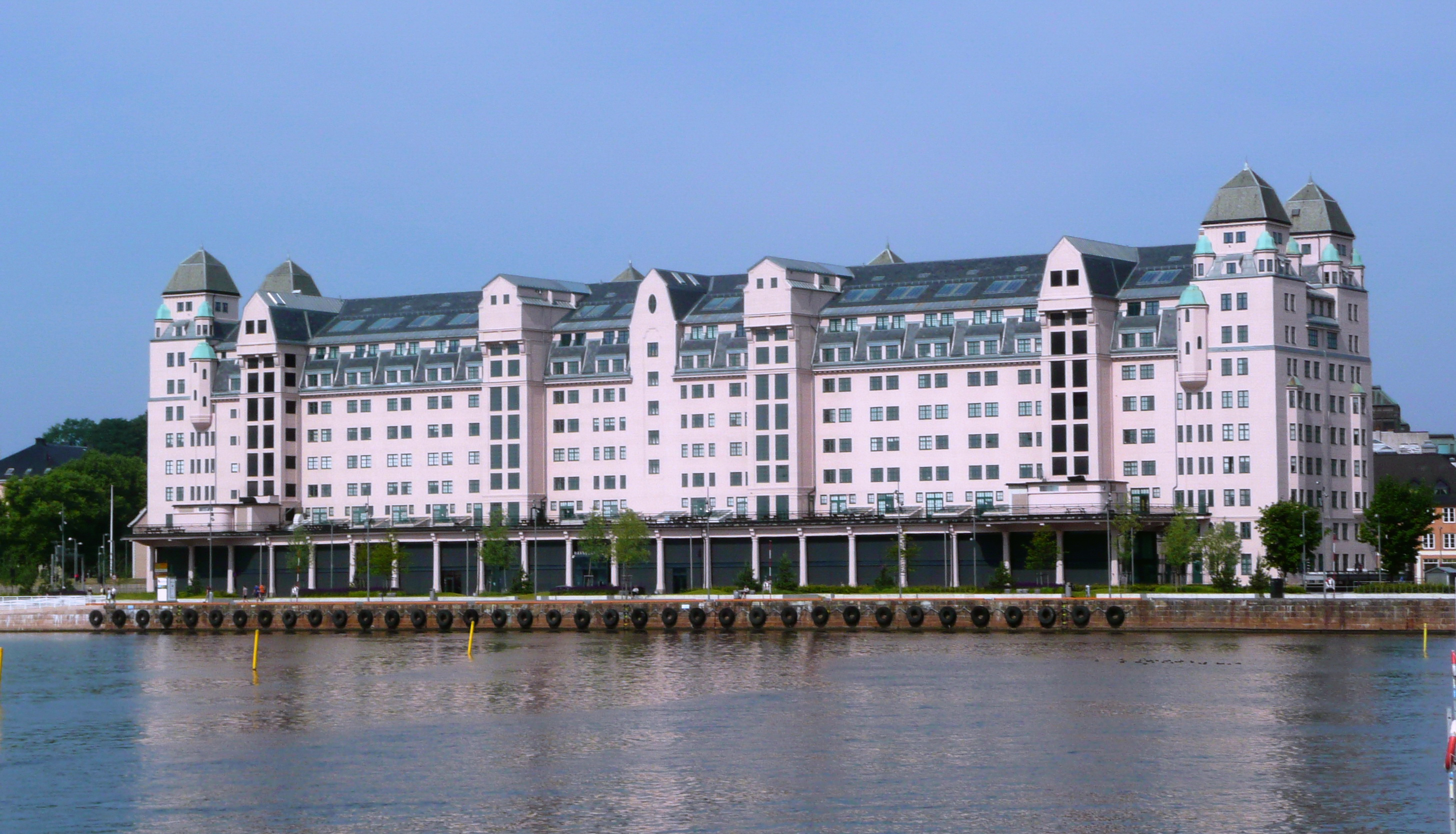 Havnelageret